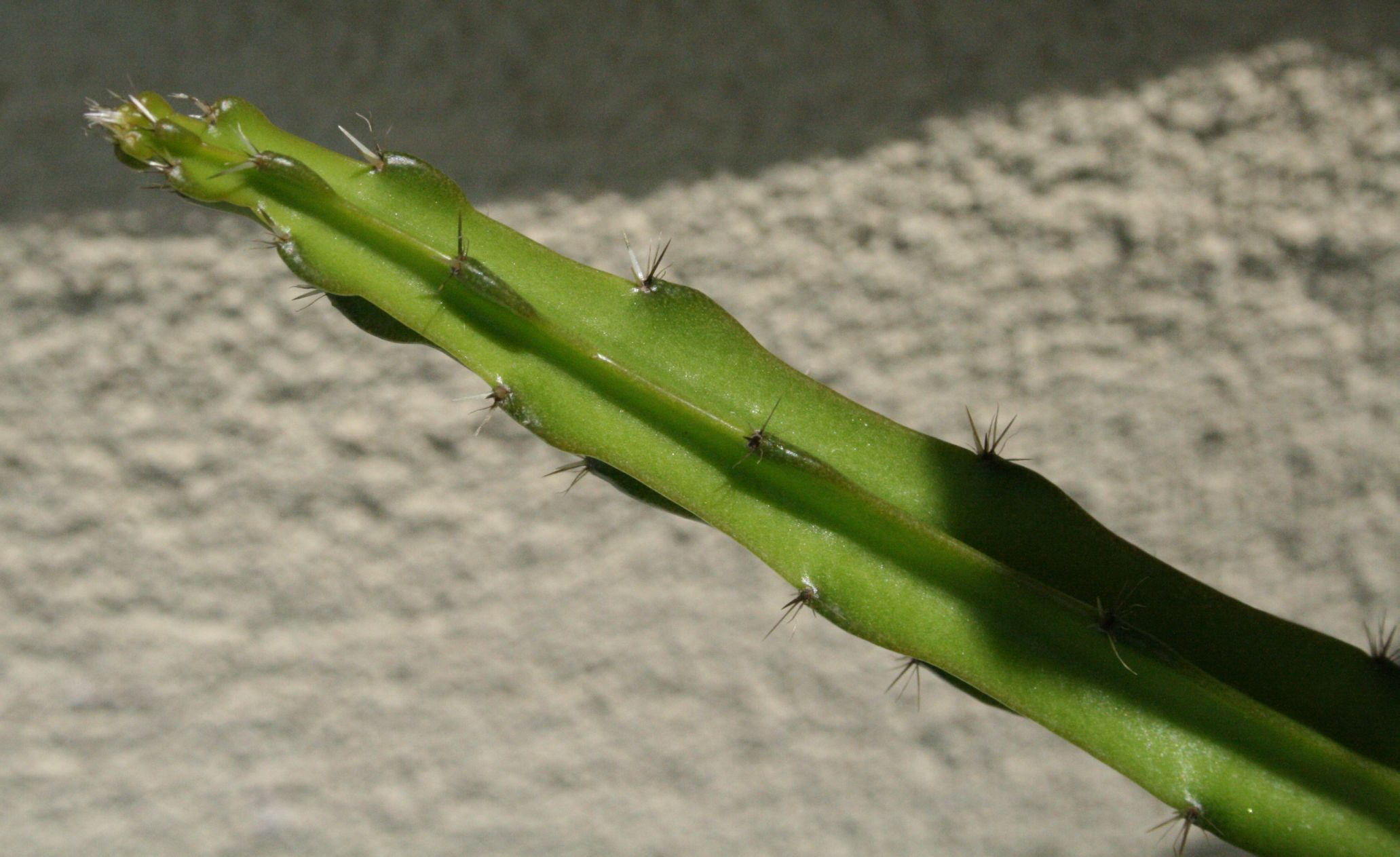 Selenicereus hamatus (Hylocereeae; Cactaceae; Planta) fiatal hajtása.